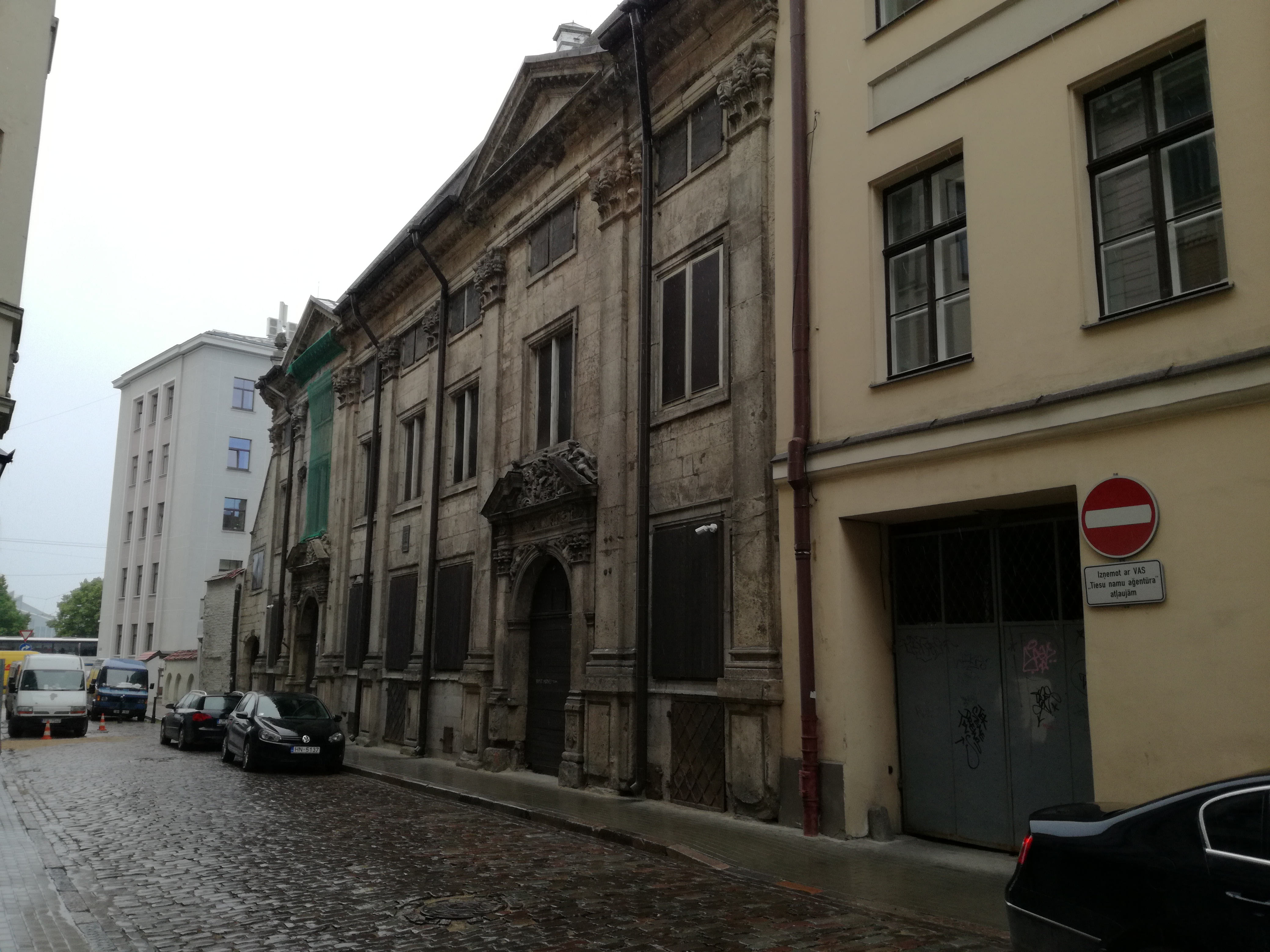 Вецрига